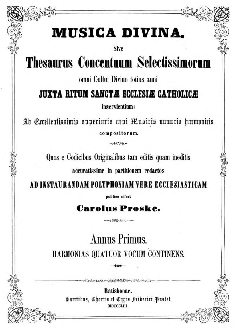 Carl Proske (Hg.): Musica Divina, Regensburg 1853, Titelseite